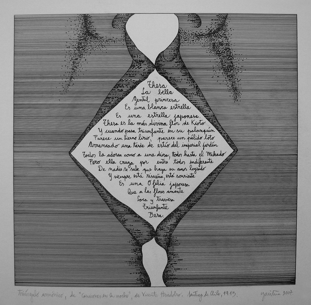 Triangulo armonico, de "Canciones en la noche", de Vicente Huidobro. Santiago de Chile, 1913. por Oscar Gacitua.